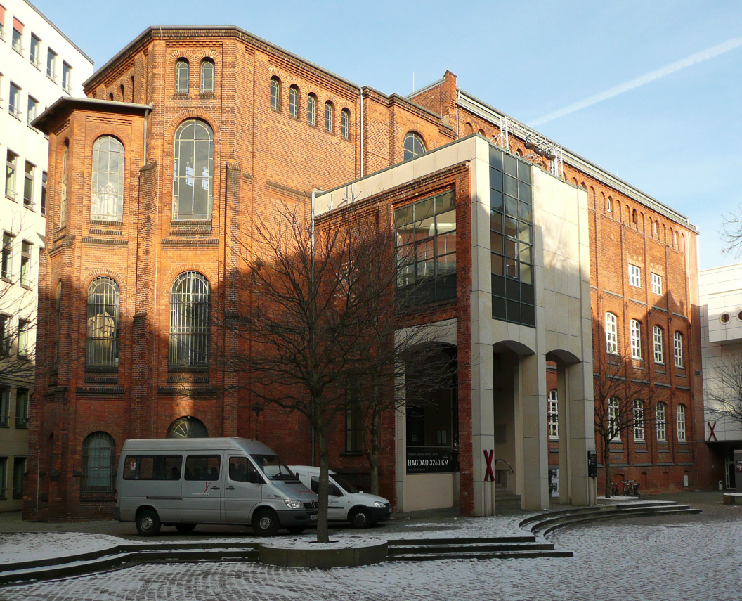 Die 1883 bis 1885 von dem Architekten Otto Goetze erbaute Cumberlandsche Galerie in Hannover war ursprünglich ein Ergänzungsbau für das im Künstlerhaus eingerichtete Museum für Kunst und Wissenschaft. Das Gebäude diente unter anderem von 1903 bis 1966 als Vaterländisches Museum, dem heutigen Historischen Museum Hannover. Nach Nutzung durch das Amerikahaus wurde der ursprünglich 9-achsige Hauptbau mit drei Saalgeschossen unter Beibehaltung der Backsteinarchitektur der Hannoverschen Architekturschule entkernt. In dem heute für das Schauspiel Hannover genutzten Gebäude findet sich das in weiten Teilen erhaltene historische Treppenhaus, das unter anderem Theateraufführungen dient.